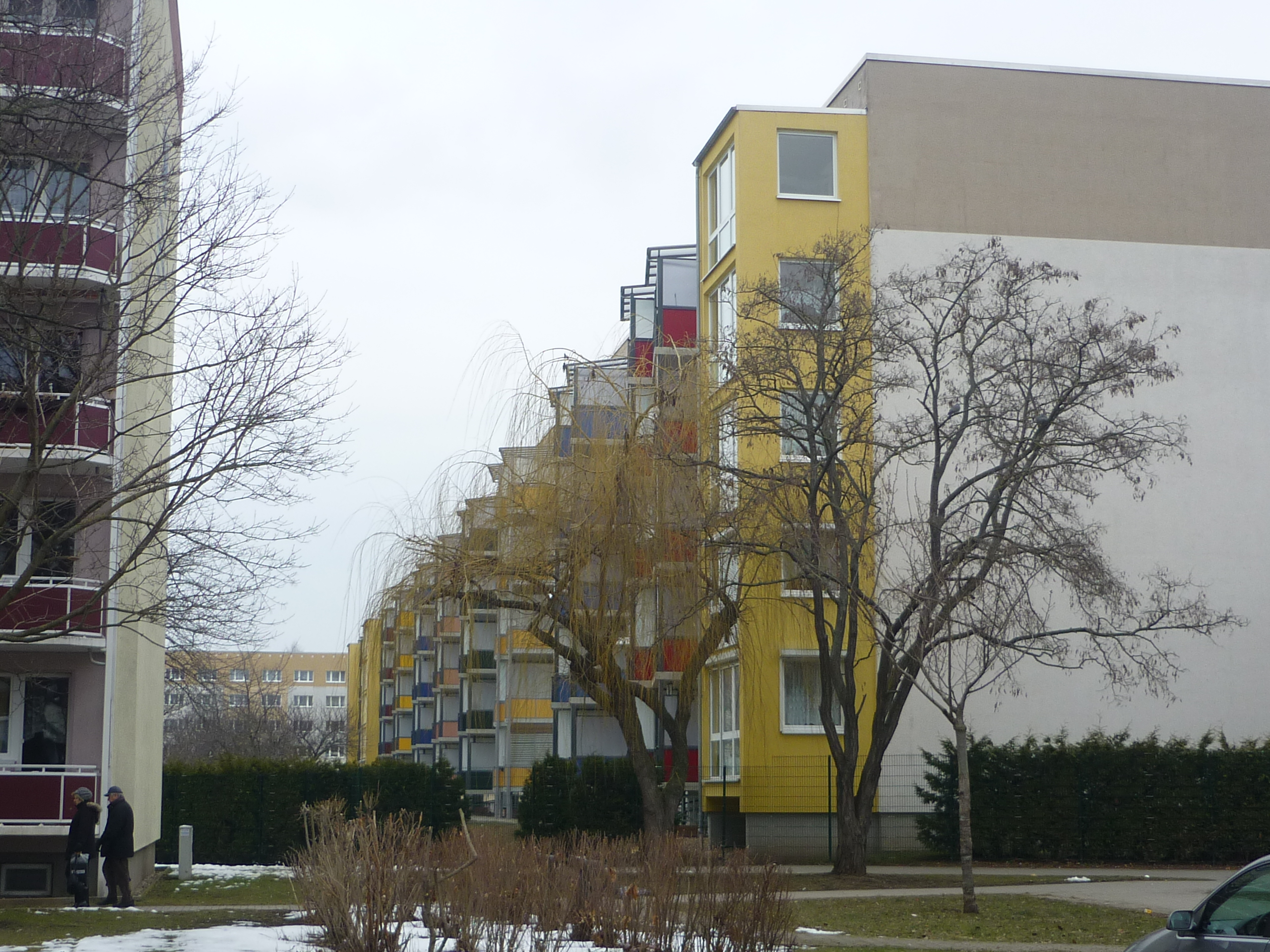 WOBLST